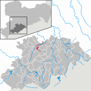 Gornsdorf in Saxony - Erzgebirgskreis